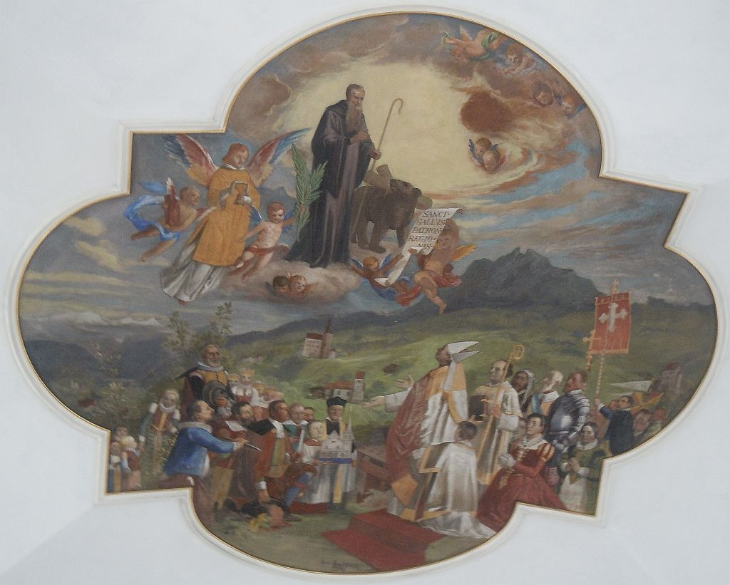 Deckengemälde in der Pfarrkirche St. Gallus und Othmar von Josef Balmer (1890)